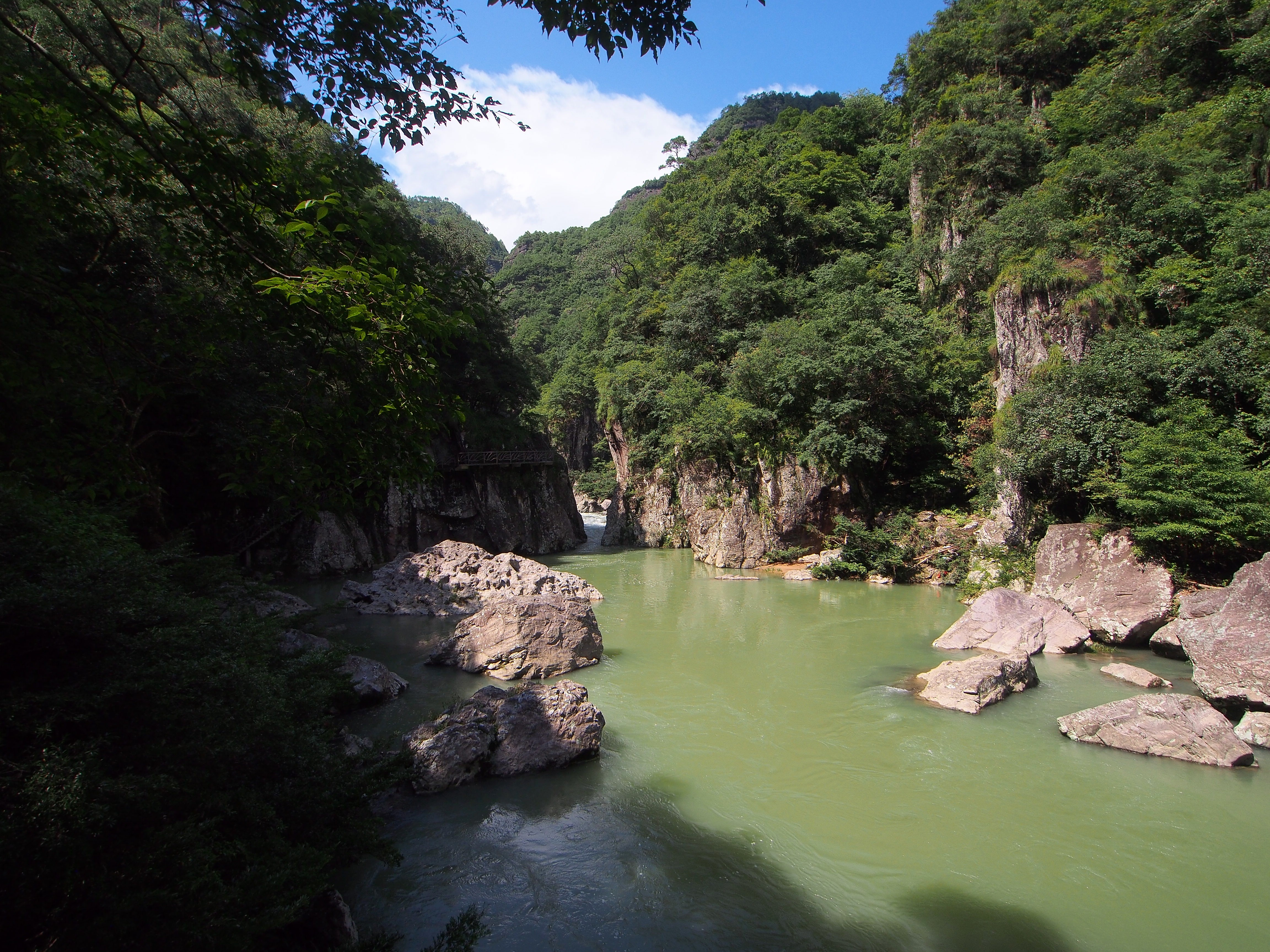 小巫峡 - Small Wuxia Gorge - 2014.07